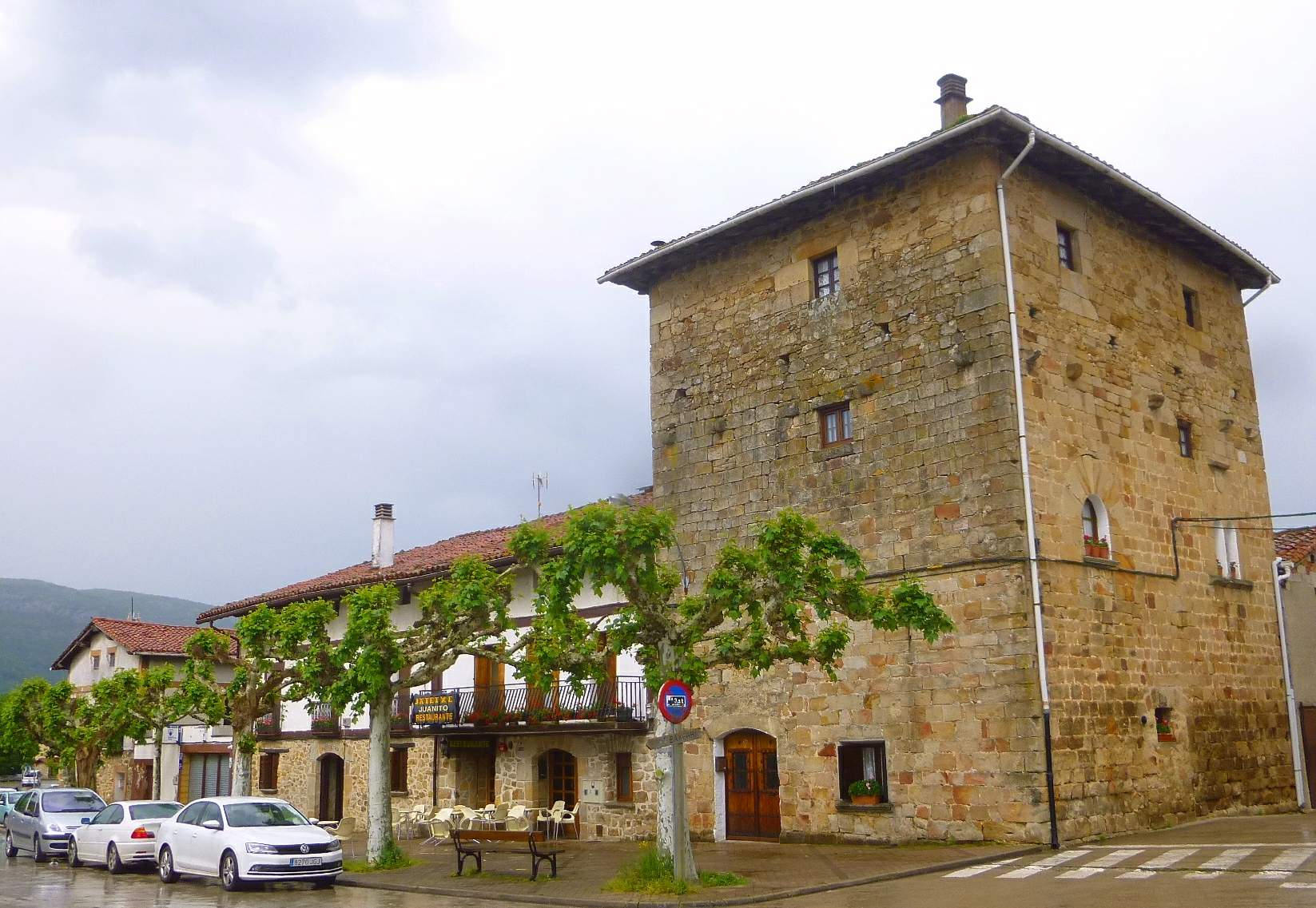 Palacio de Cabo de Armería (Arbizu, Navarra)